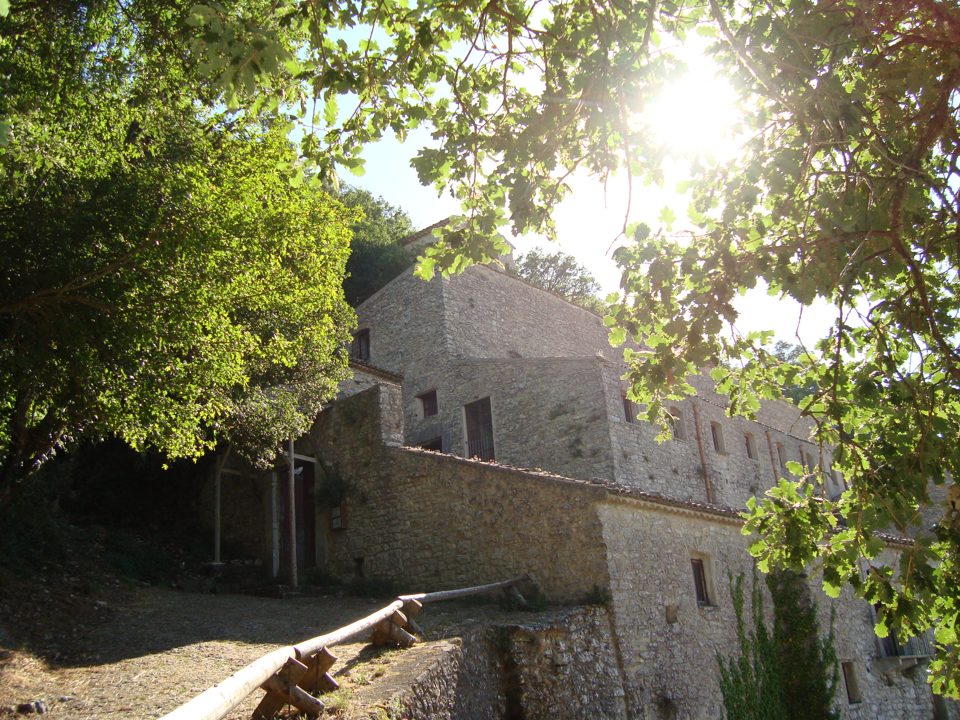 Eremo di Santa Rosalia alla Quisquina